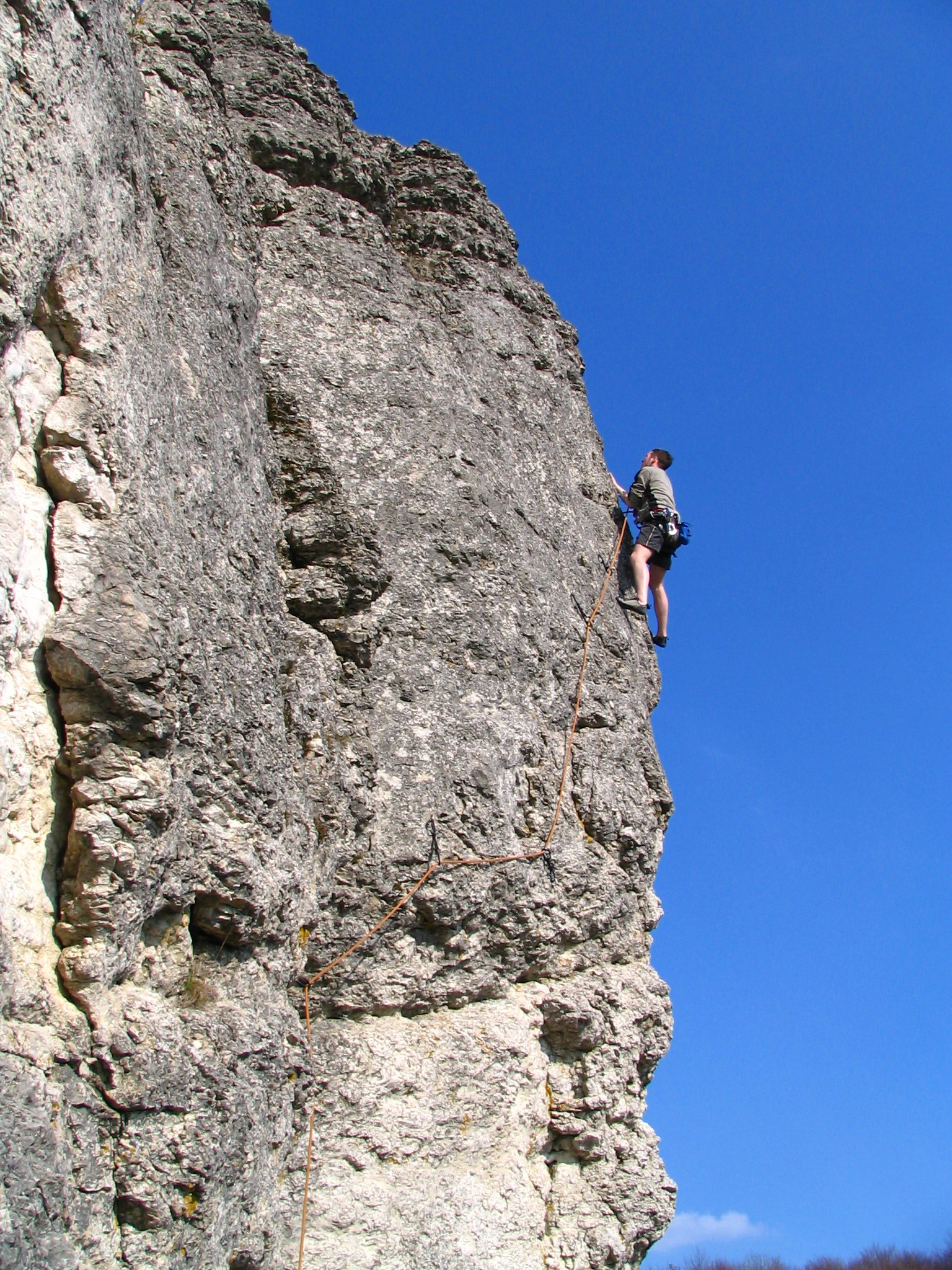 Eulenwand, nearby Tiefenellern, Fränkische Schweiz / Franconian Switzerland, Franken / Franconia, Bayern / Bavaria, Deutschland / Germany.